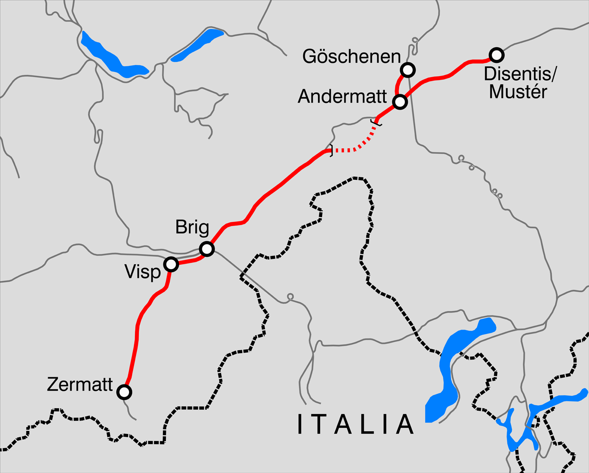 Mappa della rete Matterhorn–Gotthard-Bahn